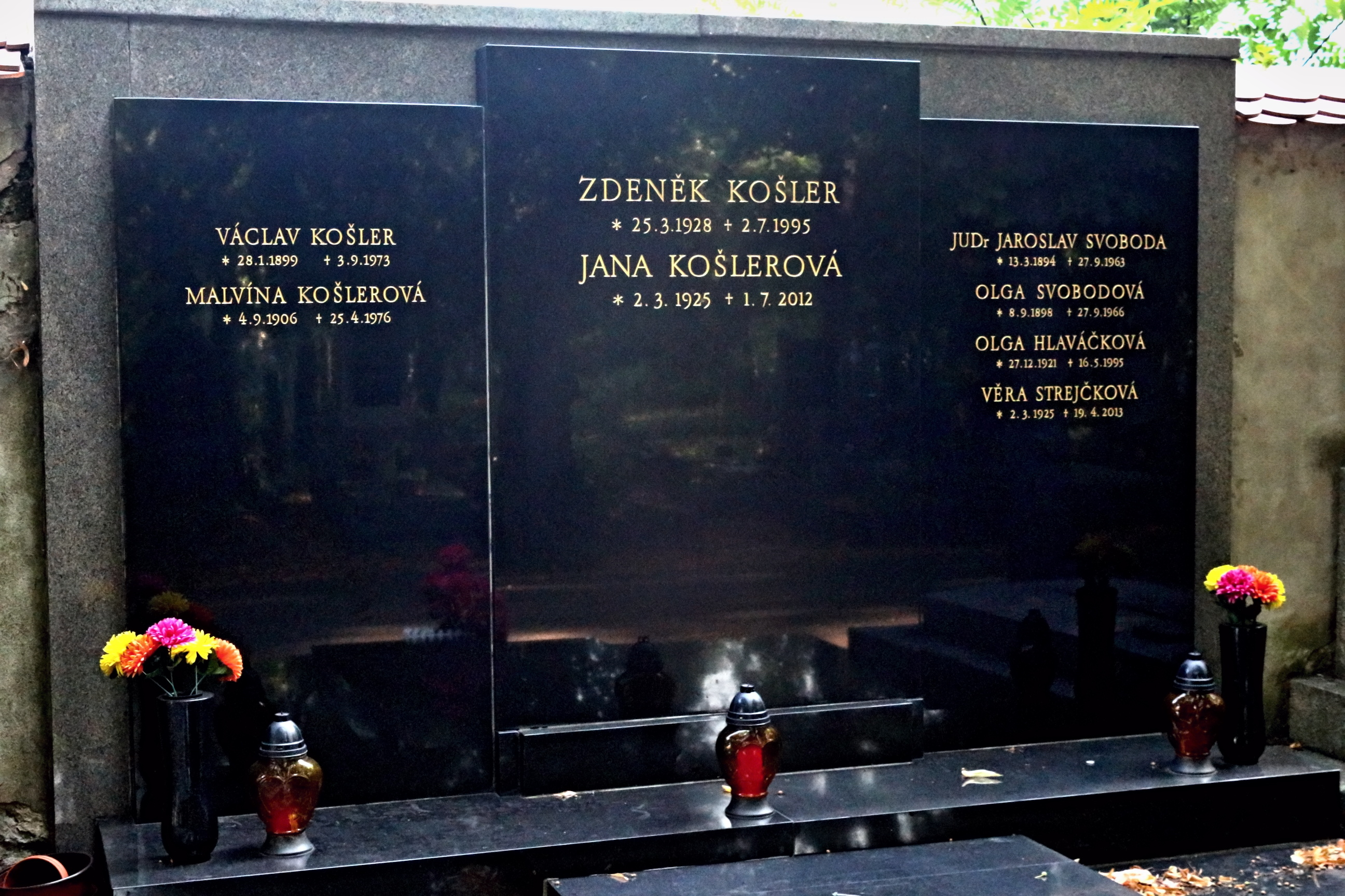 Hrob rodiny Košlerových na pražských Olšanských hřbitovech